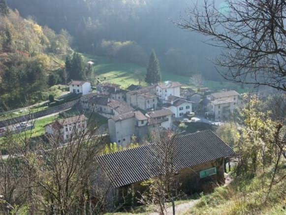 Comune di Drenchia (UD) Foto personale